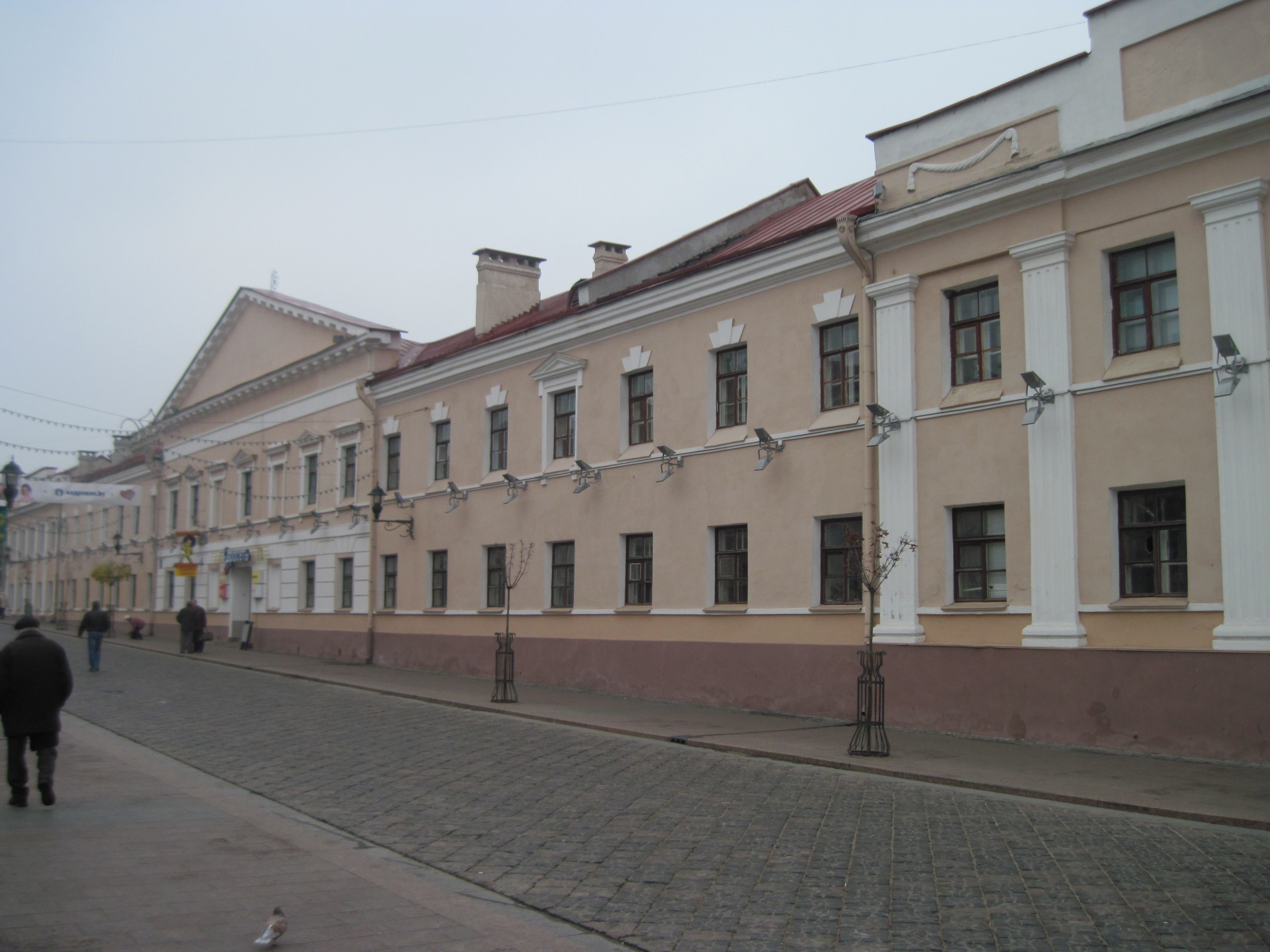 Беларуская (тарашкевіца): Фотаздымак па Савецкай, 6 у Гродне